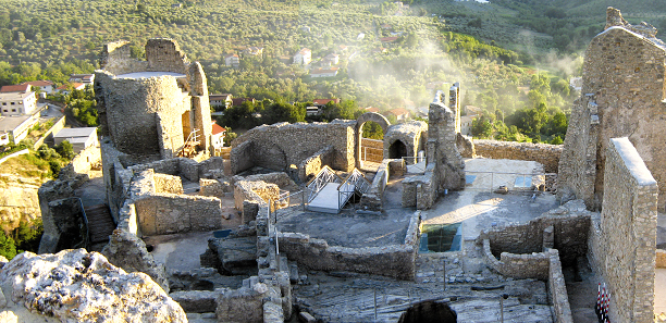 Catello di Cleto